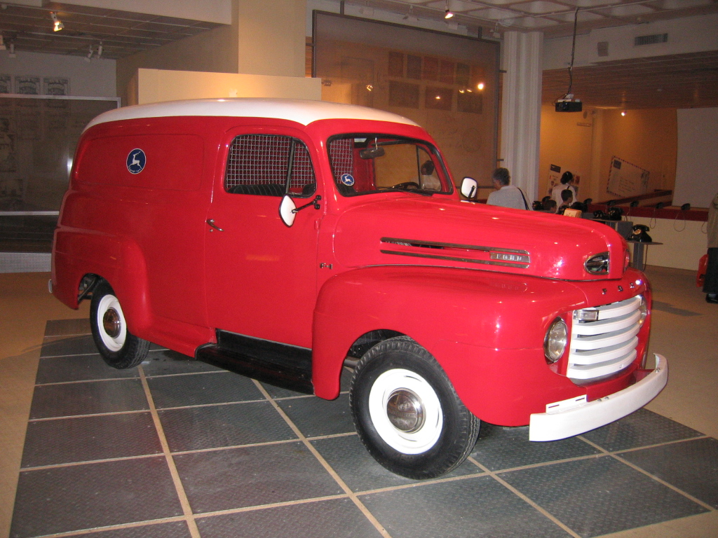 post service car, israel, 20ce., Eretz Israel Museum, Tel Aviv, Israel.